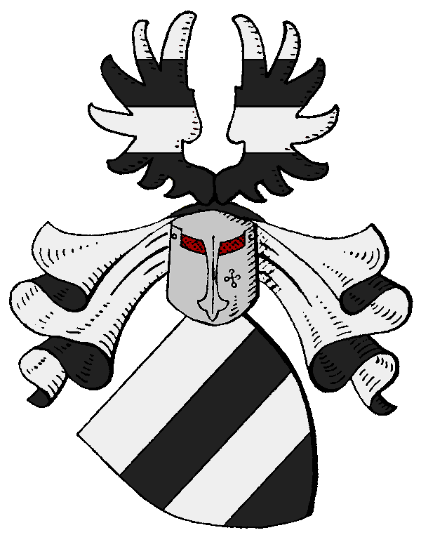 Wappen der Knuthonen mit Flug